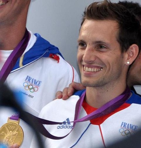 Renaud Lavillerie au défilé des médaillés français des J0 2012